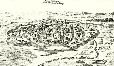 MÁRKI SÁNDOR DÓSA GYÖRGY 1470-1514 A MAGYAR TUDOMÁNYOS AKADÉMIA SEGÉLYEZÉSÉVEL KIADJA A MAGYAR TÖRTÉNELMI TÁRSULAT SZERKESZTI DR. DÉZSI LAJOS BUDAPEST AZ ATHENAEUM R.-T. KÖNYVNYOMDÁJA 1913